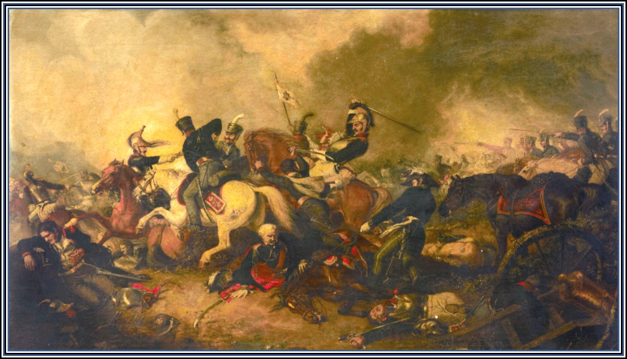 Битва при Линьи Работы Абрахама Купера